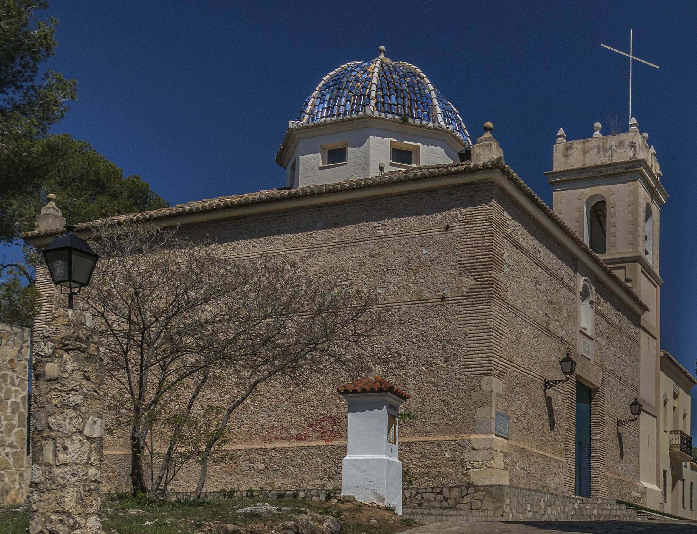 Alberic és un municipi del País Valencià, situat a la comarca de la Ribera Alta. Edifici de les darreries del segle XVIII.